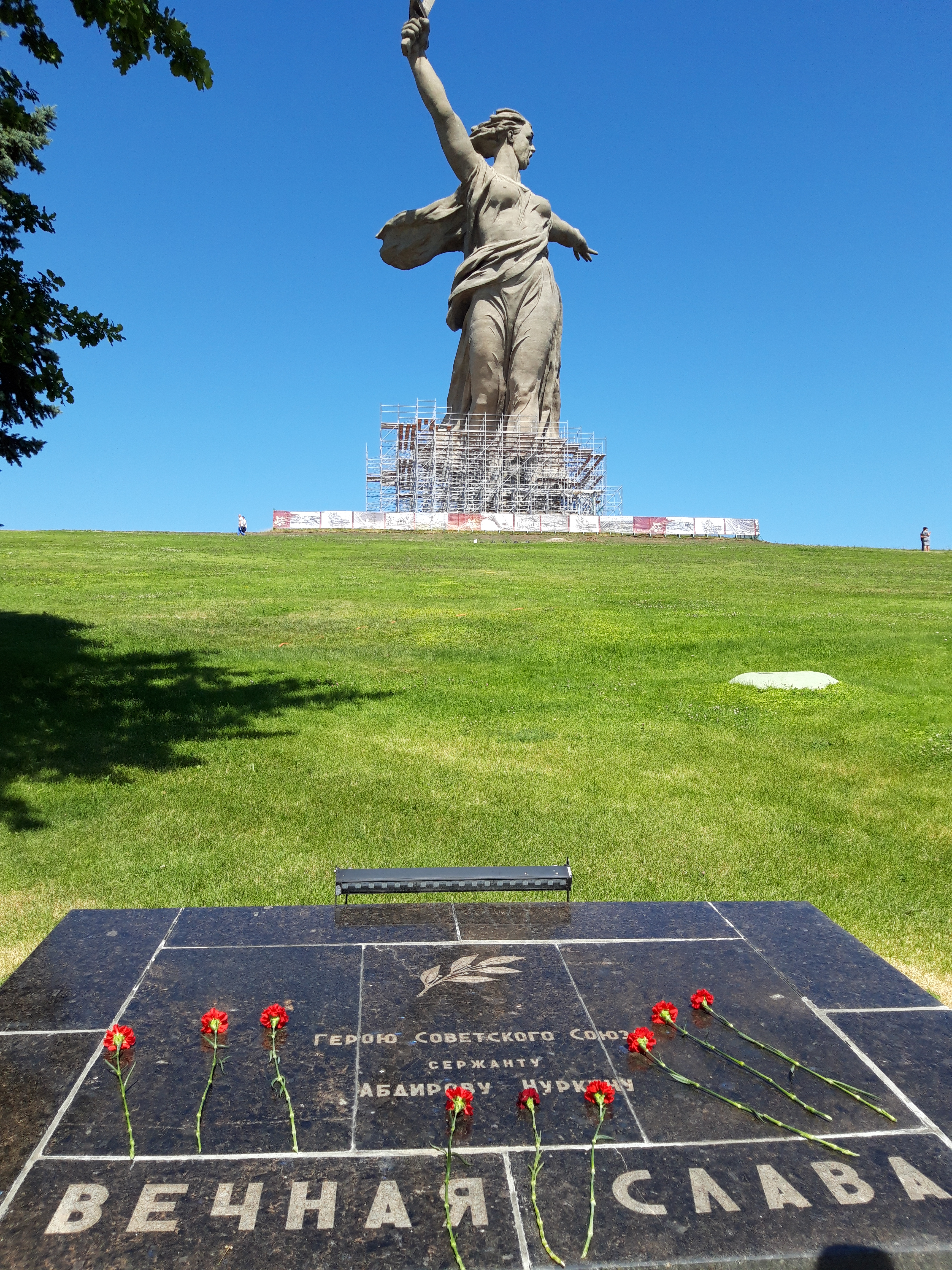 мемориальная плита Нуркену Абдирову на Мамаеве Кургане г.Волгоград